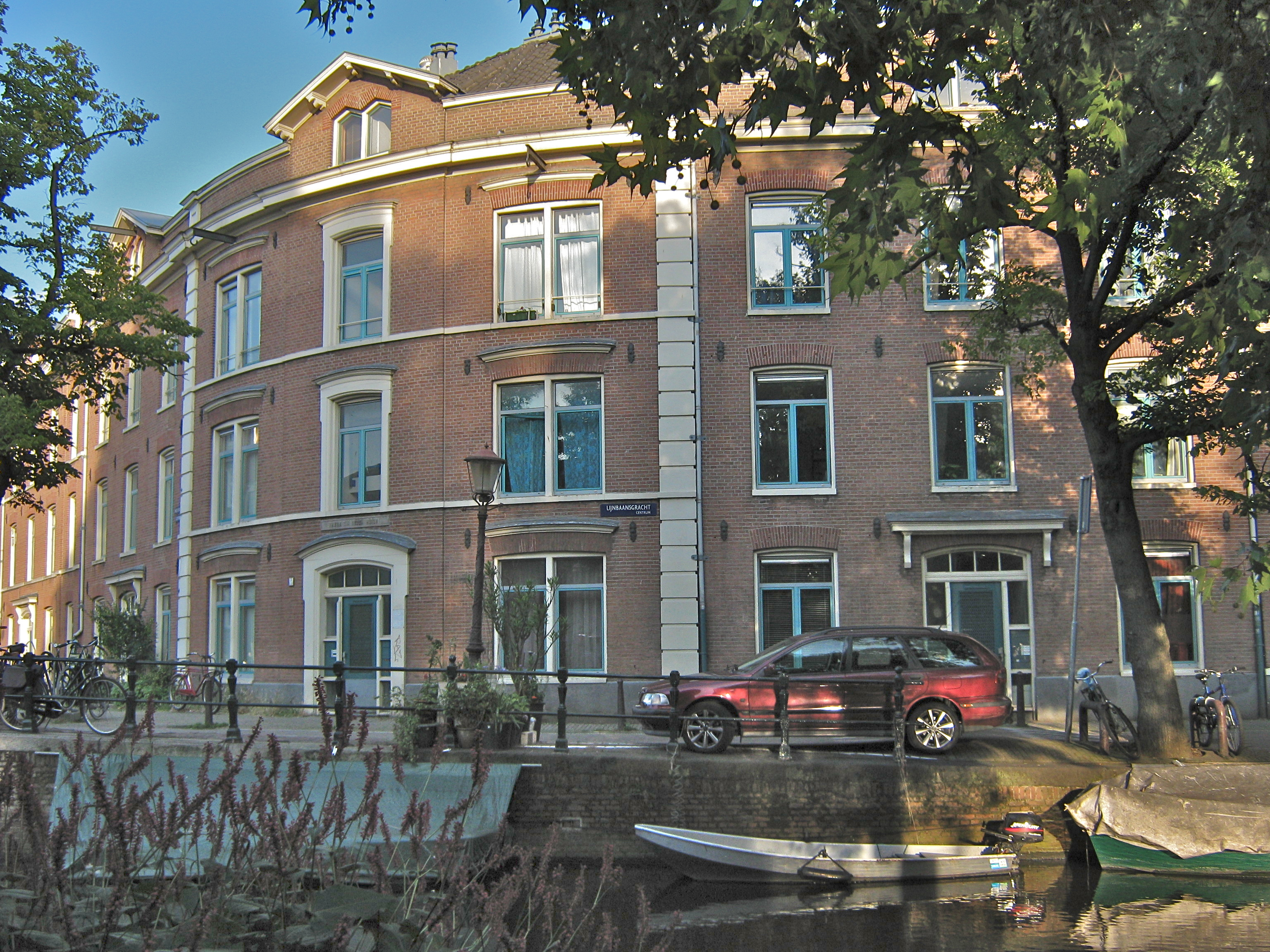 Gebouwd door H.S. van Lennep in 1862, ondergebracht in Bouwmaatschappij Concordia in 1864